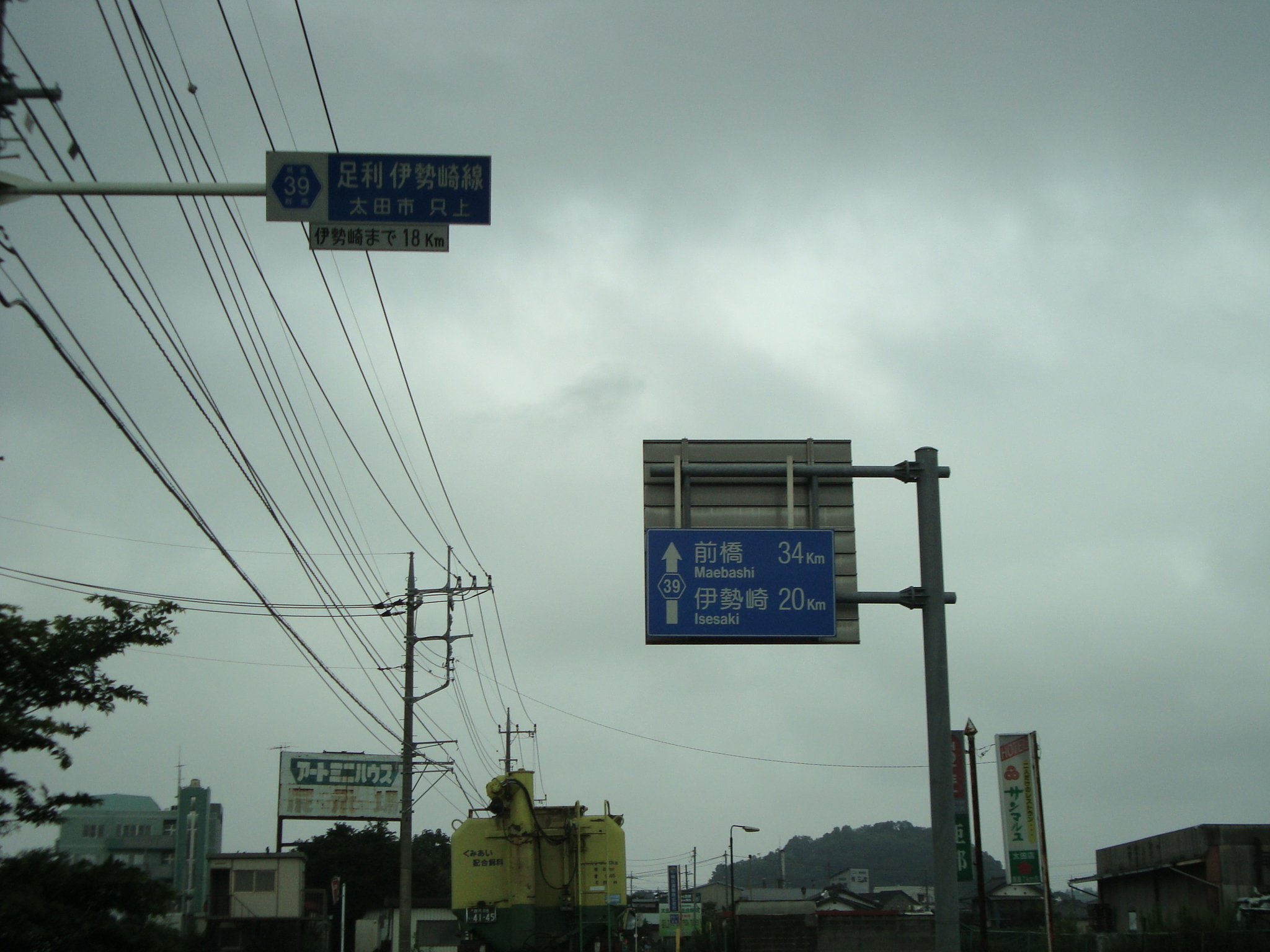 栃木県道・群馬県道39号 足利伊勢崎線 群馬県太田市只上付近